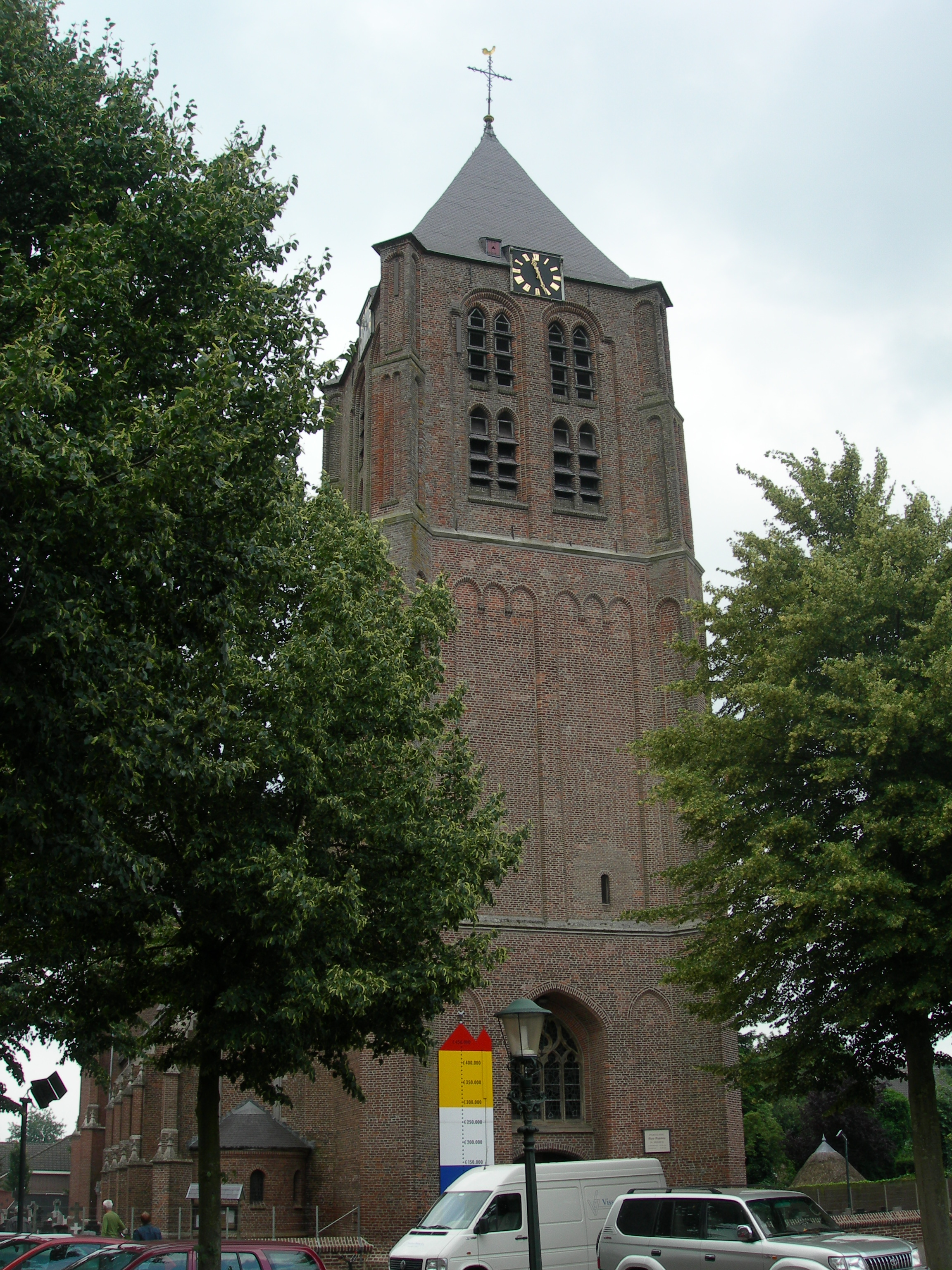 Kerk Geffen